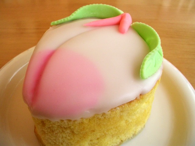 A peach castella.